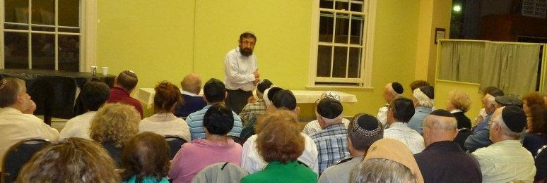 Dr. Pinchas Polonsky at a lecture in Berlin in 2011